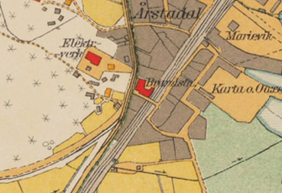 Del av 1934 års karta över Stockholm med omgivningar visande Liljeholmens brandstation och Nybohovsstationen